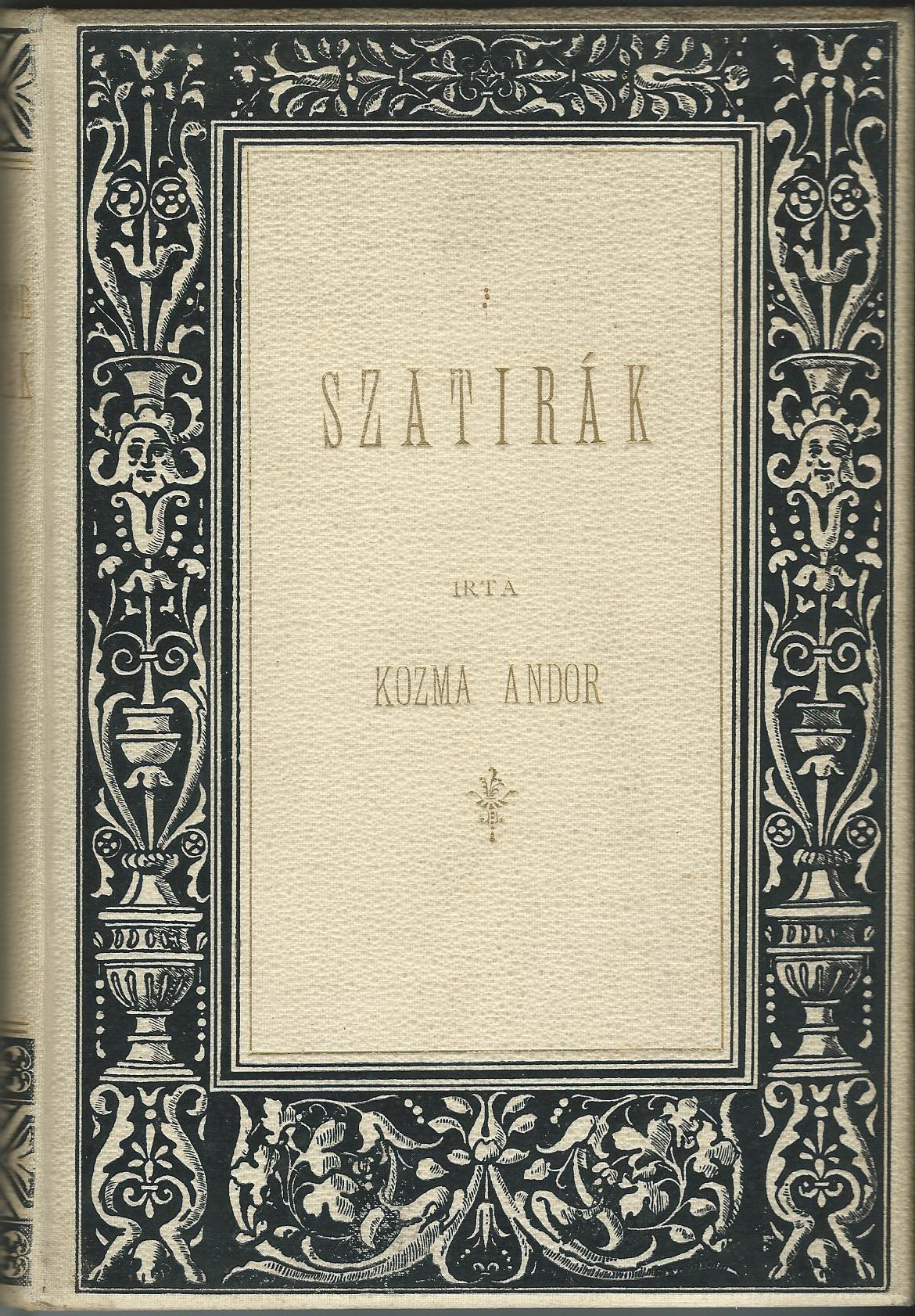 Kozma Andor: Szatírák c. 1898-ban megjelent könyvének borítója (Athenaeum R.T. kiadás, Gottermayer-kötés)